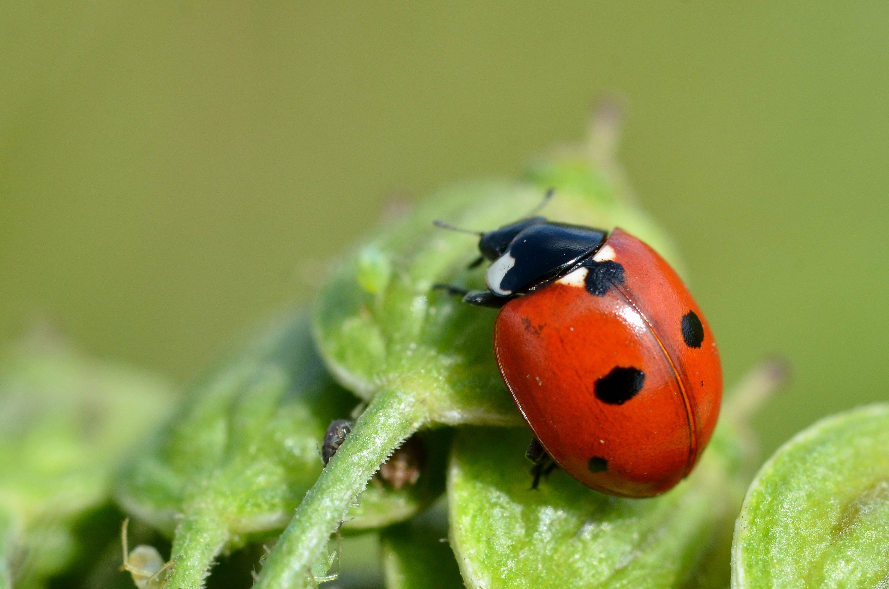 Coccinella quinquepunctata